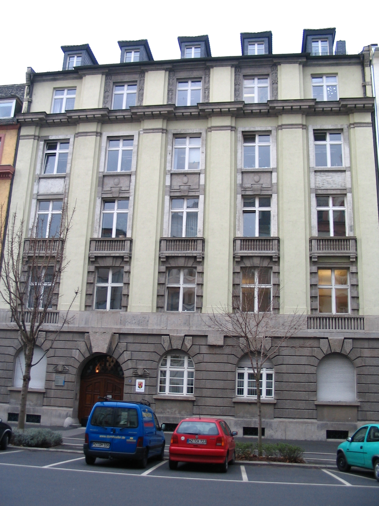 Das Gebäude des Verwaltungsgerichts Mainz in der Ernst-Ludwig-Straße 9 in Mainz, in der sich ursprünglich die Großherzoglich-Hessische Weinbau-Domäne befand.